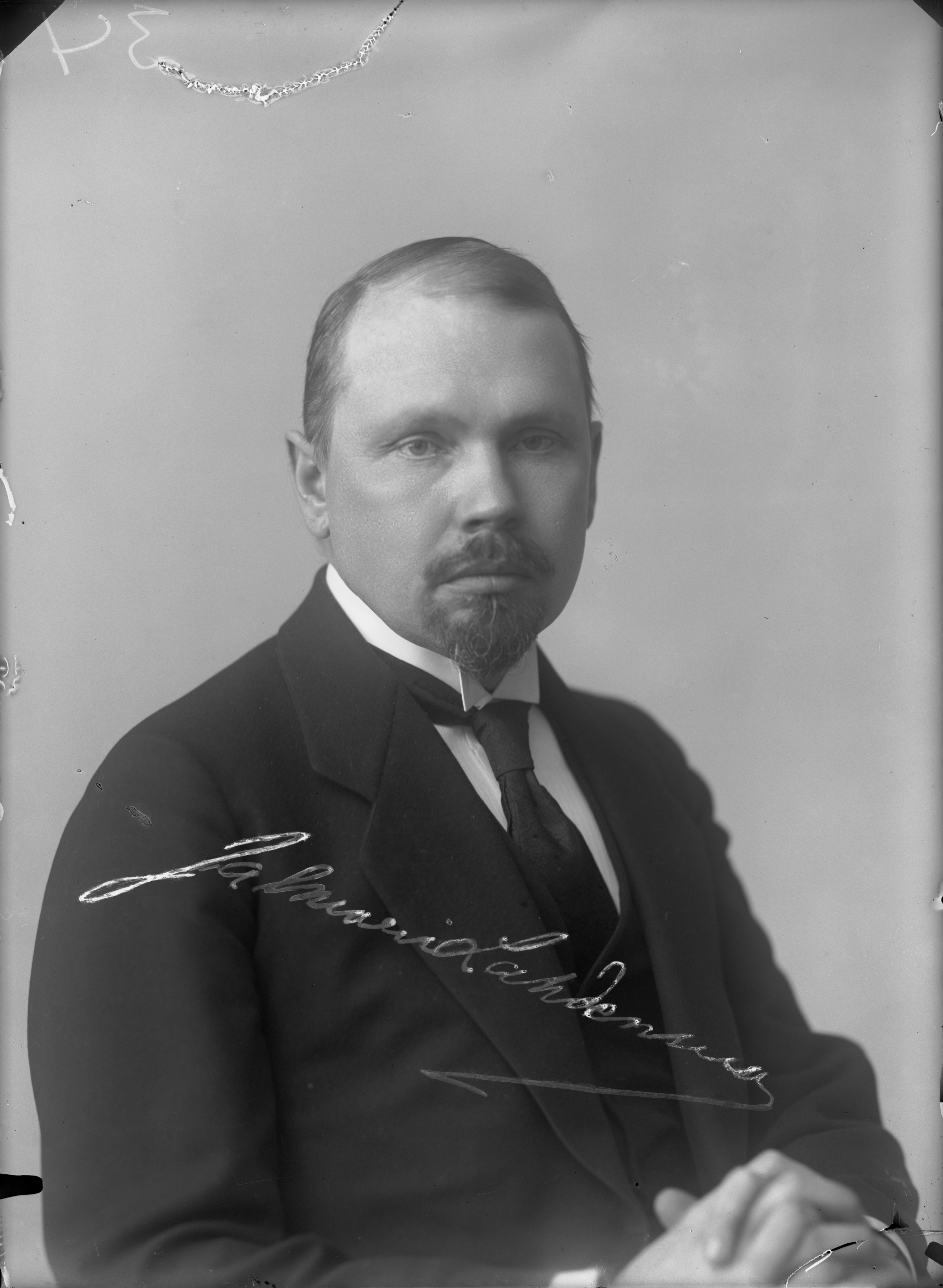 Jalmari Lahdensuo